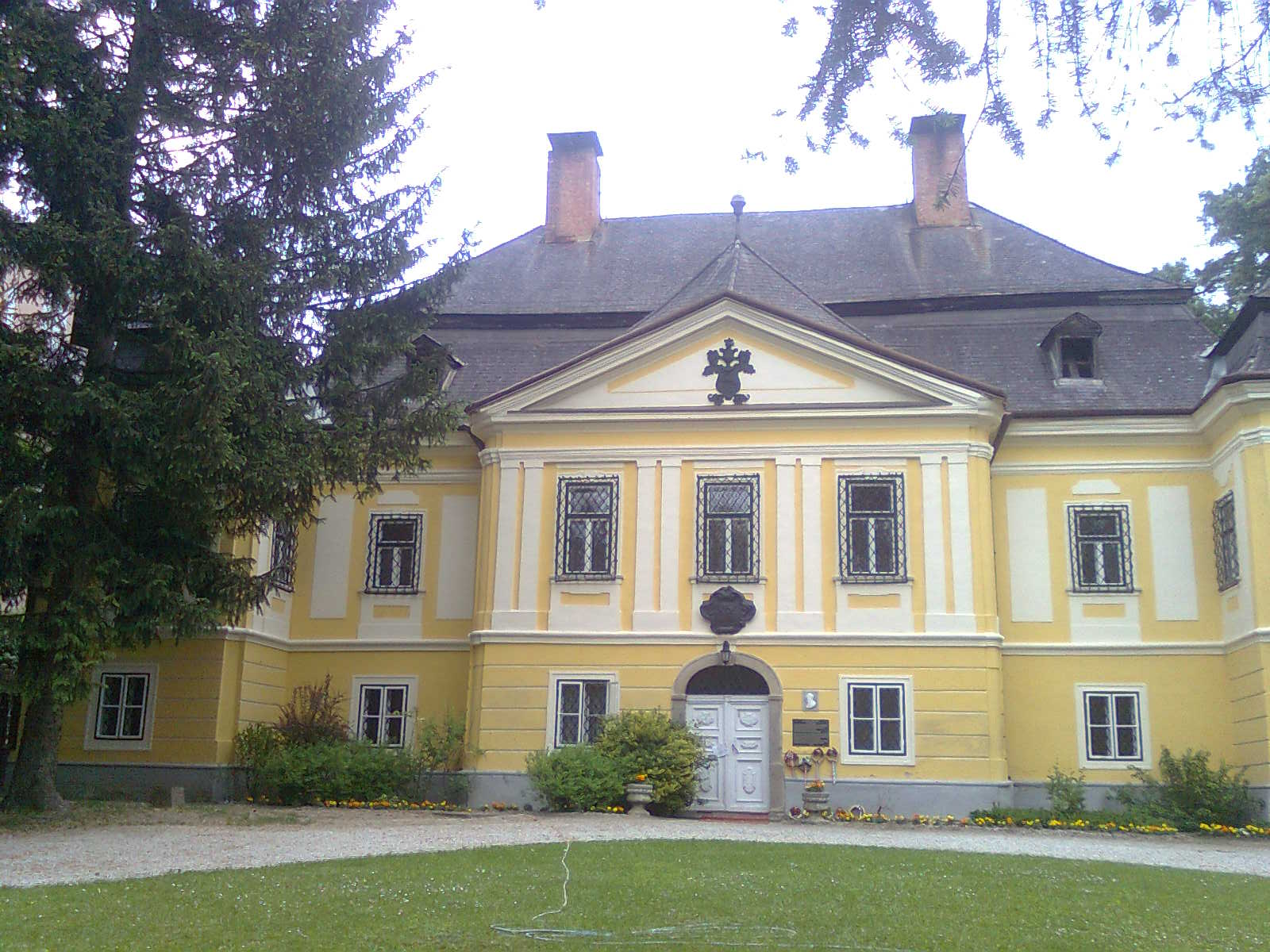 A Bánfalván található Platthy-kastély képe a kastélyudvarról.